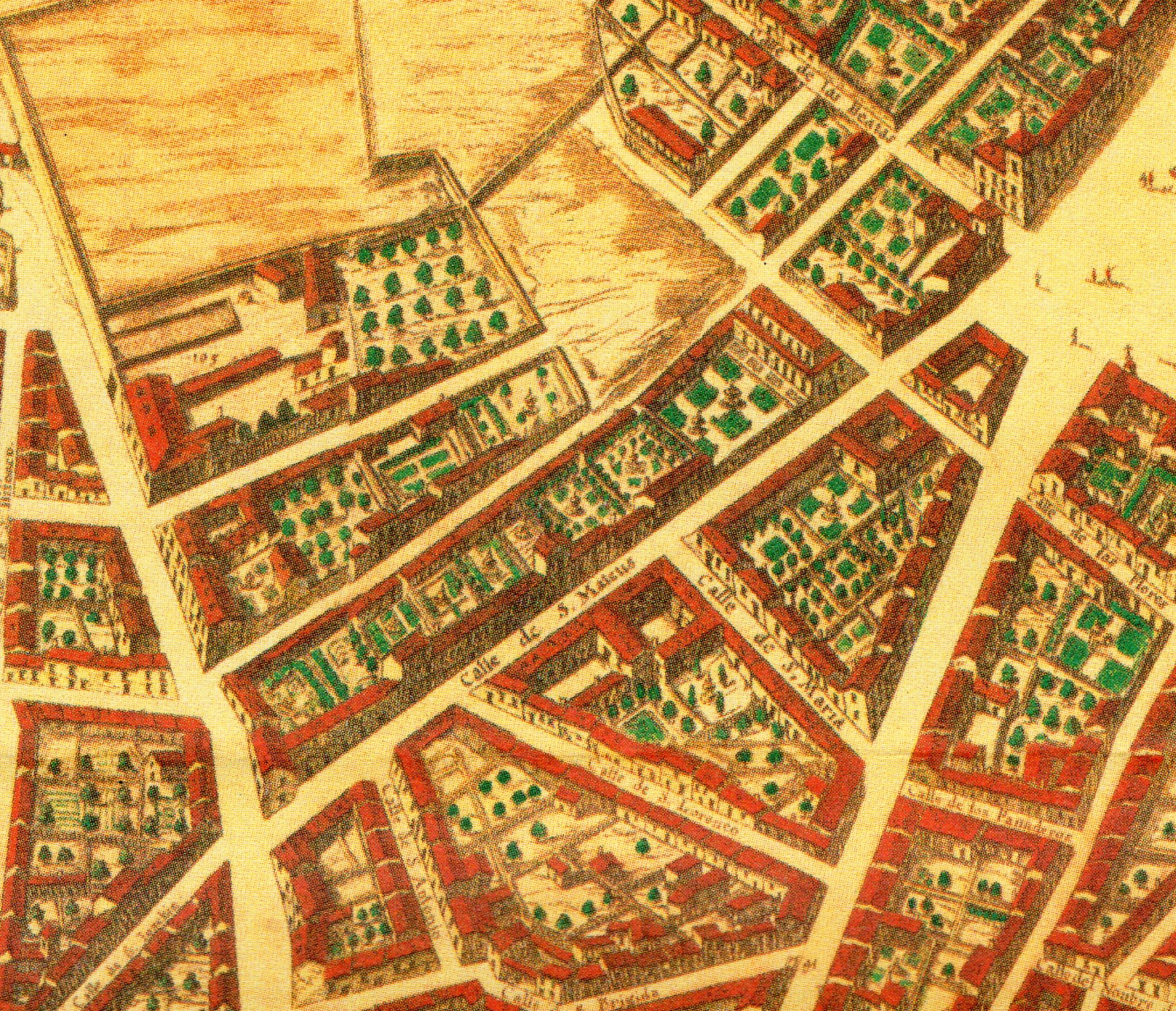 Topografía de la Villa de Madrid descrita por Don Pedro Texeira en 1656, en la cual se demuestran todas las calles al largo y ancho de cada una de ellas, las rinconadas y lo que tuercen las Plazas, fuentes, jardines y huertas con la disposición que tienen las parroquias, Monasterios y Hospitales están señalados sus nombres con letras y números que se hallaran en la tabla y los demás edificios, torres y delanteras de las casas de la parte que mira al Mediodía están sacadas al natural que se podrán tocar las puertas y ventanas de cada una de ellas.